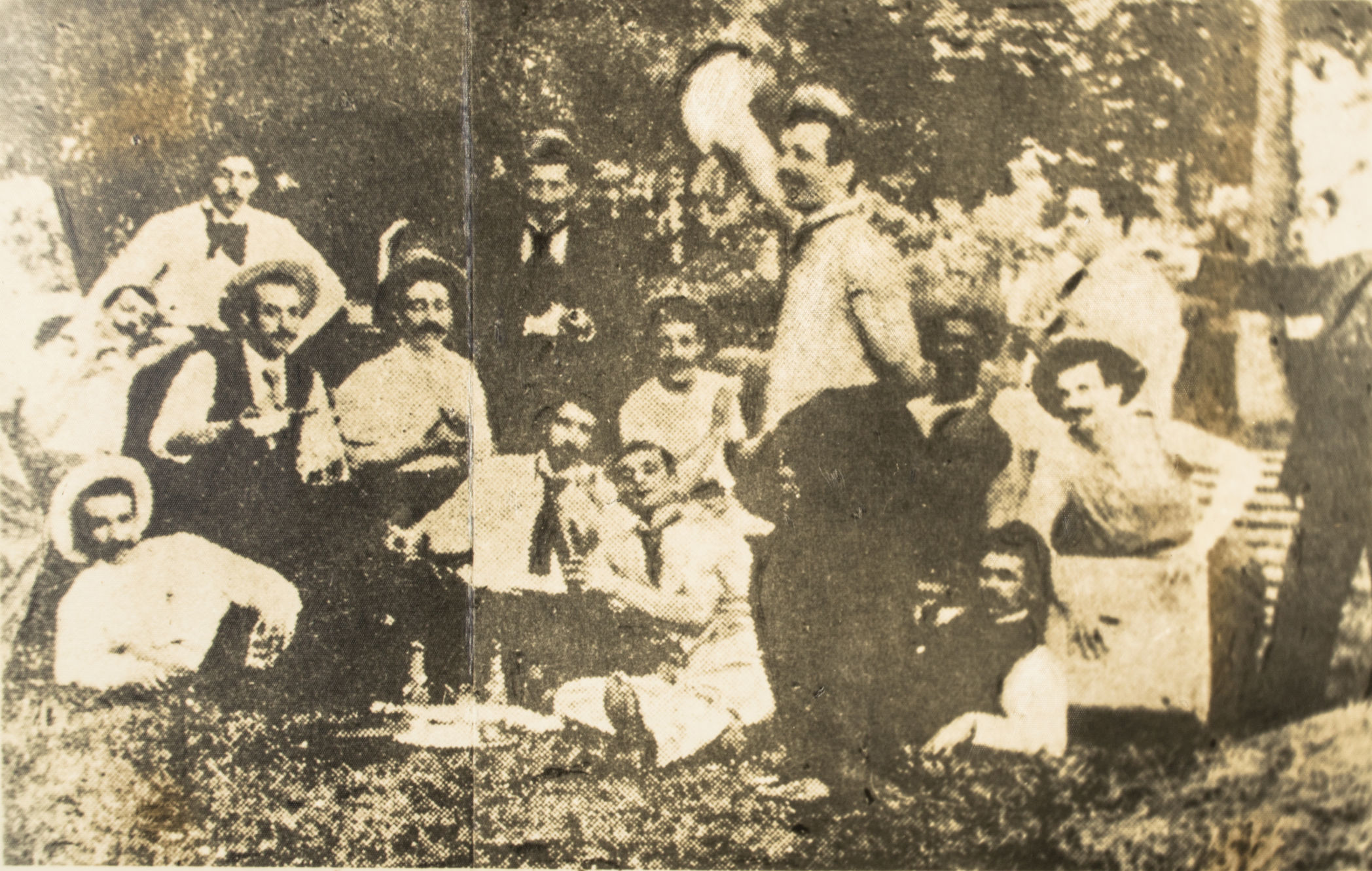 Foto Impresa del Grupo bohemio "La Palizada". Leyenda: "…era, sin duda, el grupo más representativo de la bohemia limeña de fin de siglo. […] aparecen entre otros, Jesús Menacho, bailando; Pepe Ezeta, con el cajón; Augusto Paz, Fernando Soria, Juan Castro Ozete". [fotografía]